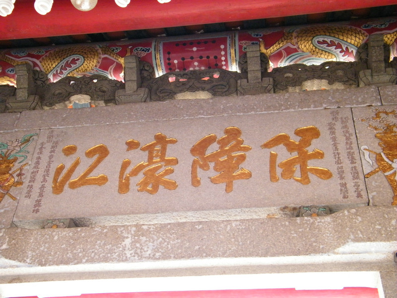 達濠巡司埠雙忠古廟 正門後面的匾刻“保障濠江” 乾隆己亥年（1799）建。